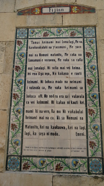 Church of the Pater Noster, Mount of Olives, Jerusalem, Israel כנסיית אבינו שבשמים Sanctuary of the Eleona